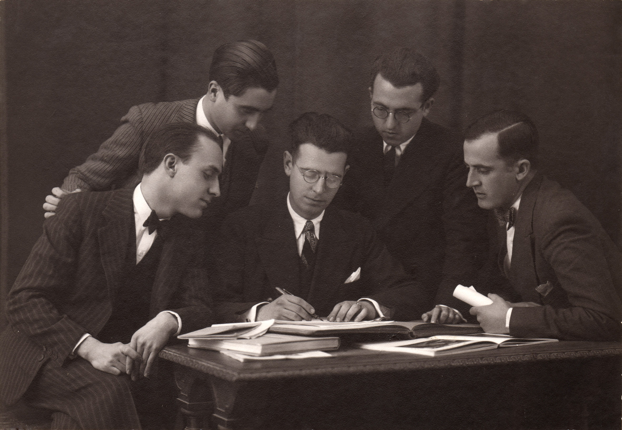 Group of the Young Ones, composers from Valencia (Spain), in 1934, picture by Novella